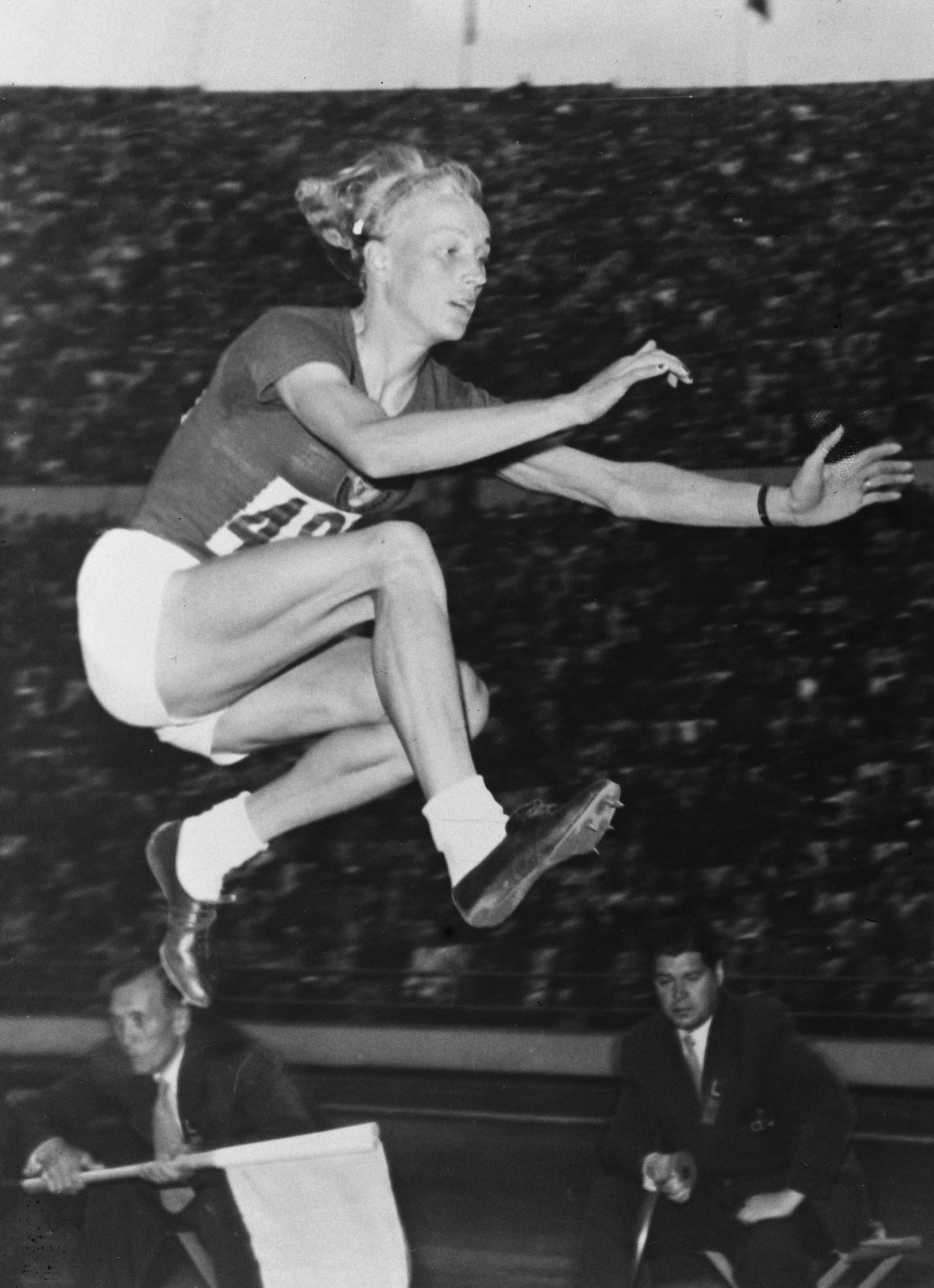 Olympische Spelen in Helsinki. Aleksandra Chudina